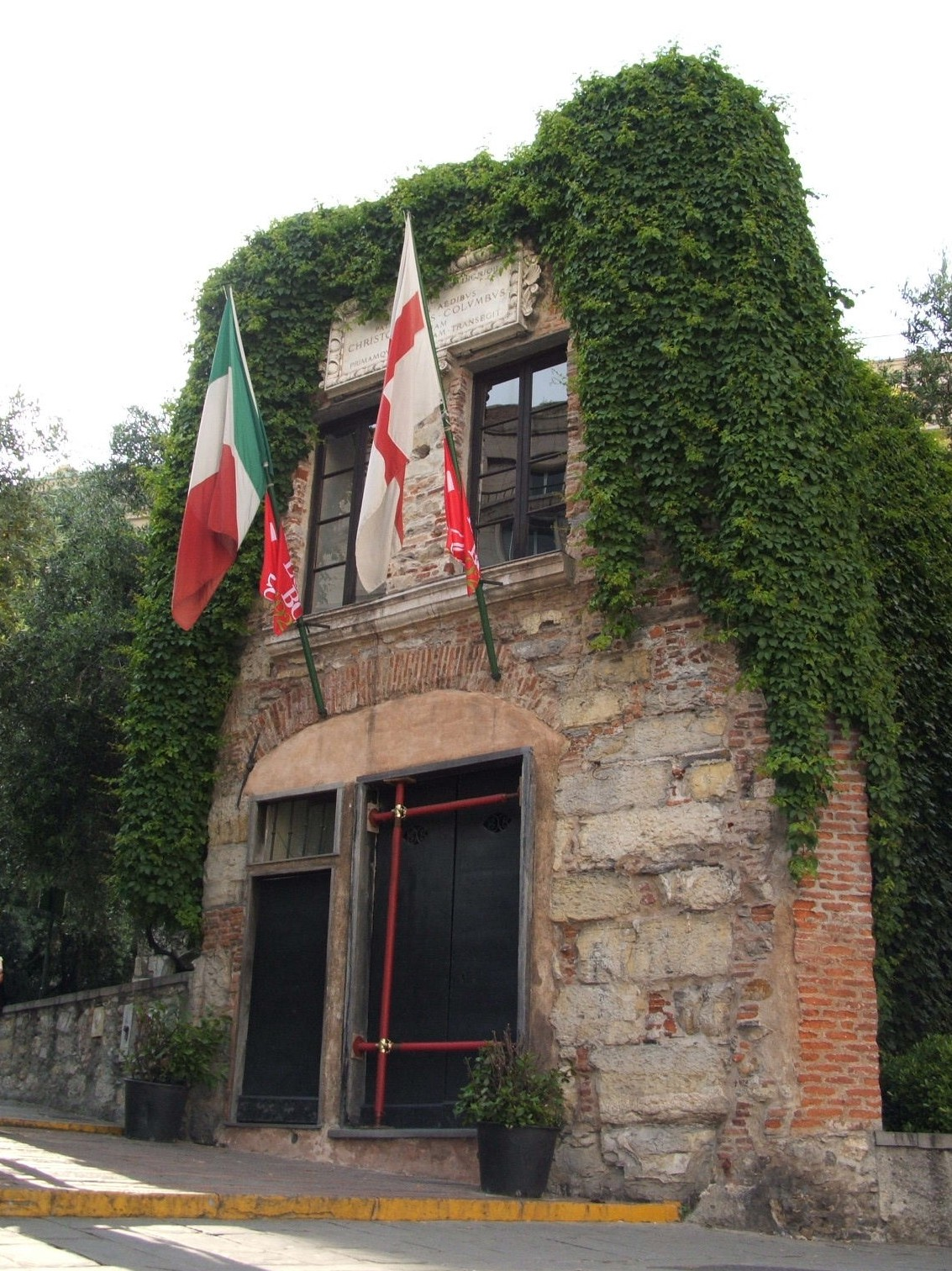 Genova, Piano di Sant'Andrea, casa di Cristoforo Colombo (Christopher Columbus)